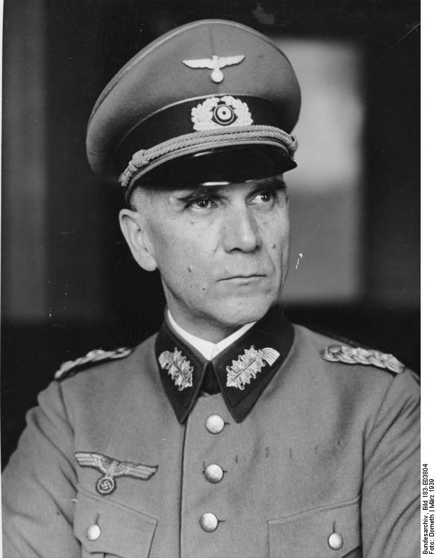 Liebmann, Curt General der Infanterie Curt Liebmann, Kommandeur der Kriegsakademie, feiert am 20.3. sein 40jähriges Militärdienstjubiläum. 18.3.1939 Abgebildete Personen: Liebmann, Curt: General, Kommandeur der Kriegsakademie, Heer, Deutschland